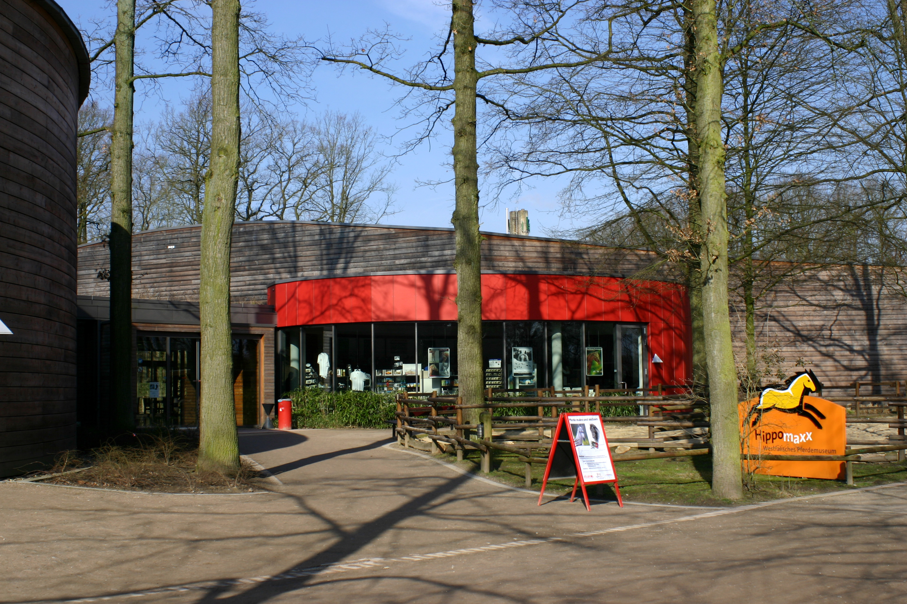 Westfälisches Pferdemuseum - Hippomaxx